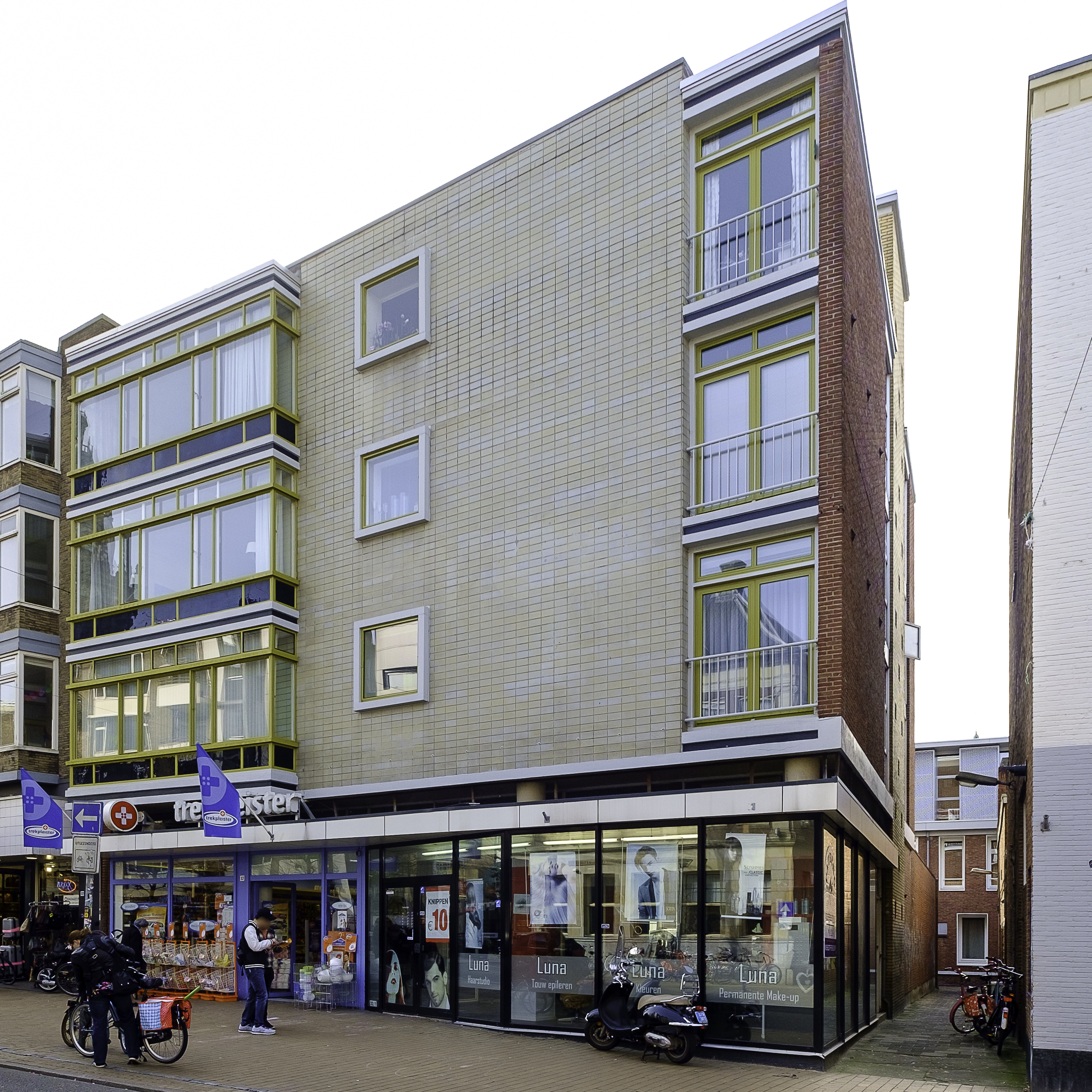 Oude Ebbingestraat 32-32/1